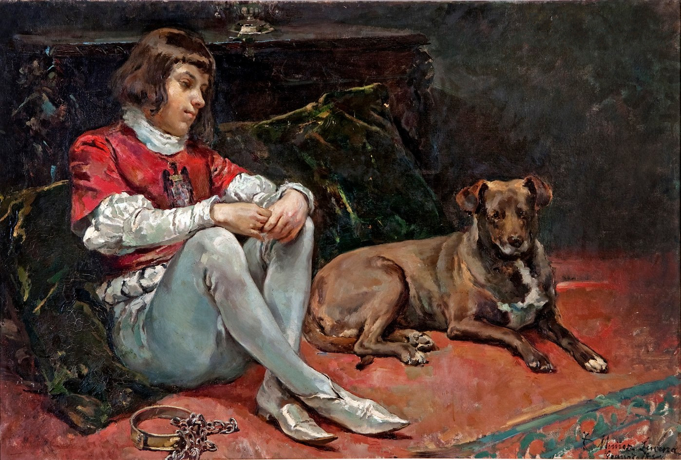 La obra muestra al joven príncipe Carlos de Viana (1421-1461), que era hijo del rey Juan II de Aragón y hermanastro del rey Fernando II de Aragón, encerrado en la prisión en la que fue encarcelado por orden de su padre y en la que moriría con sospechas de haber sido envenenado también por mandato paterno.